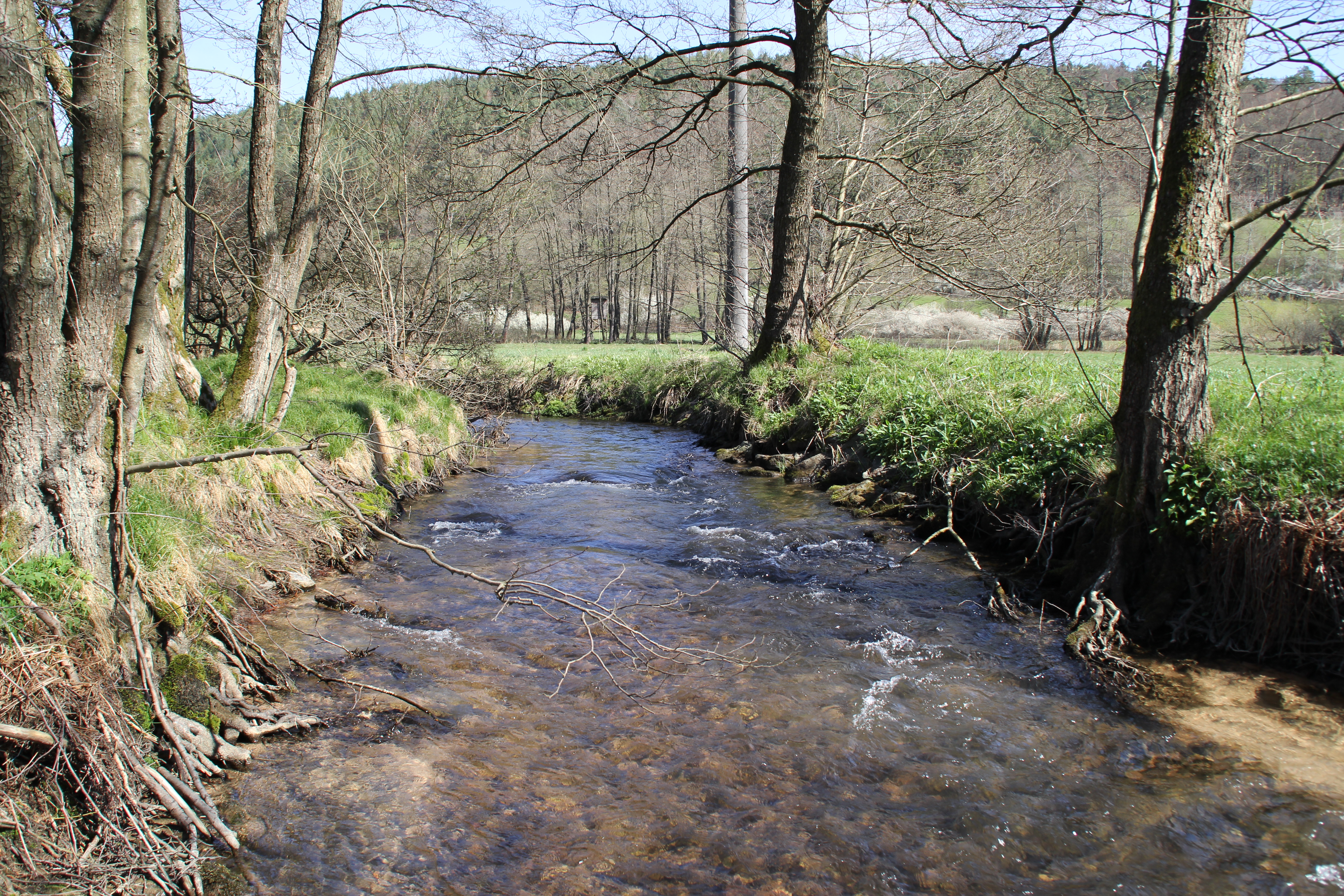 Der Aubach bei Wiesthal, Bayern